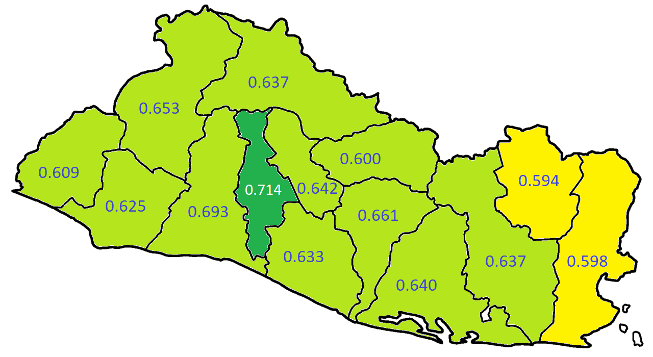 Departamentos de El Salvador por IDH según nueva metodología de 2013